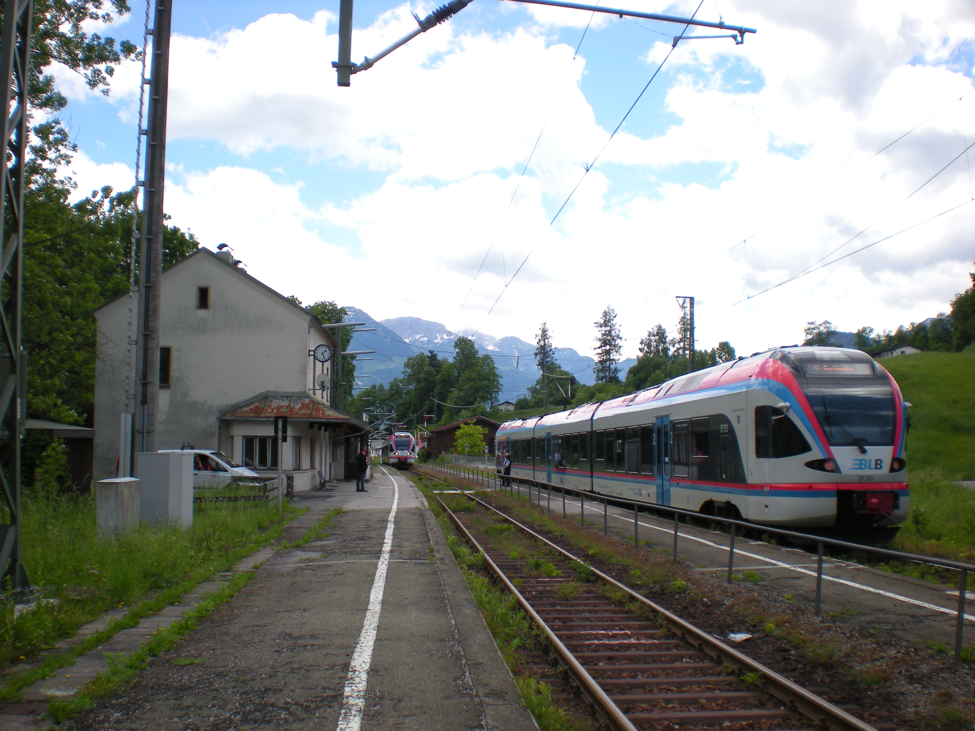 Bahnhof Bischofswiesen mit zwei sich kreuzenden Zügen der BLB